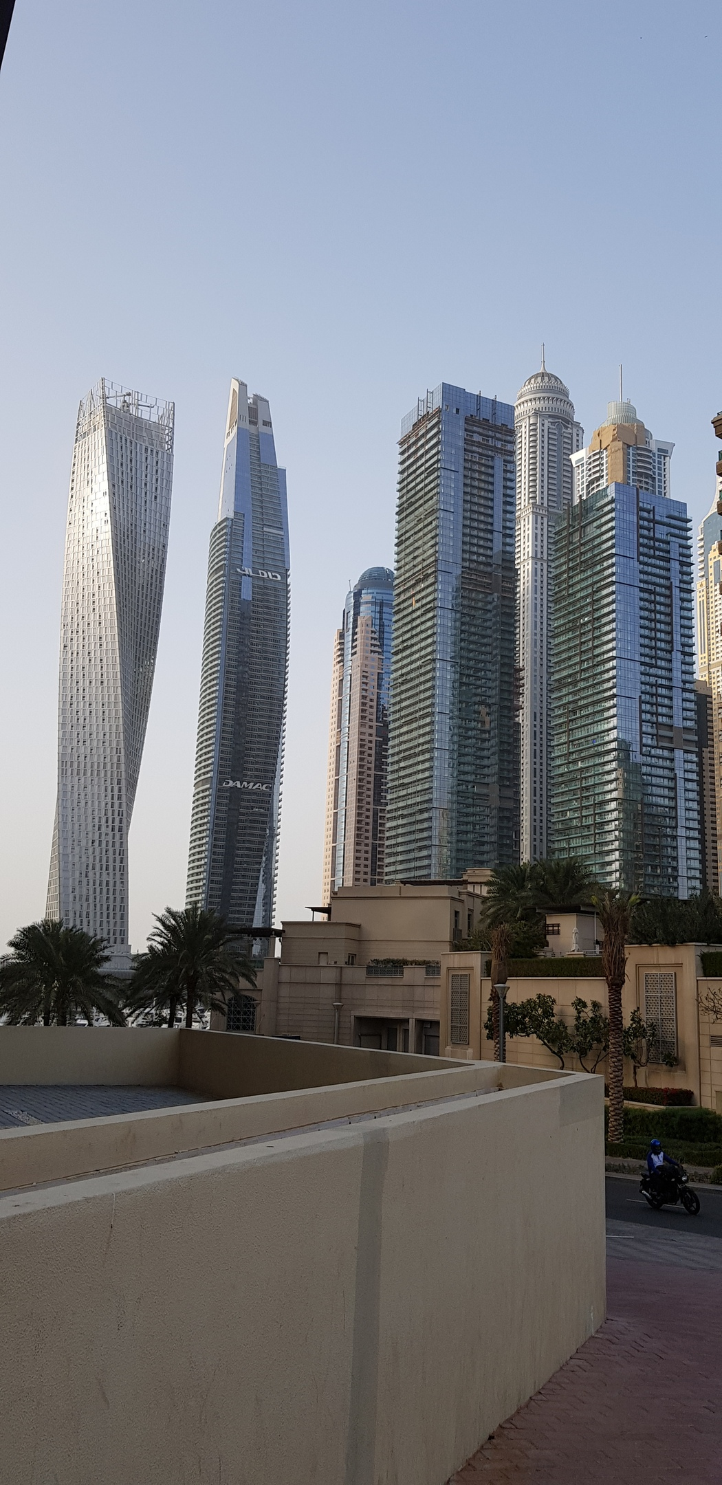 Январь 2019